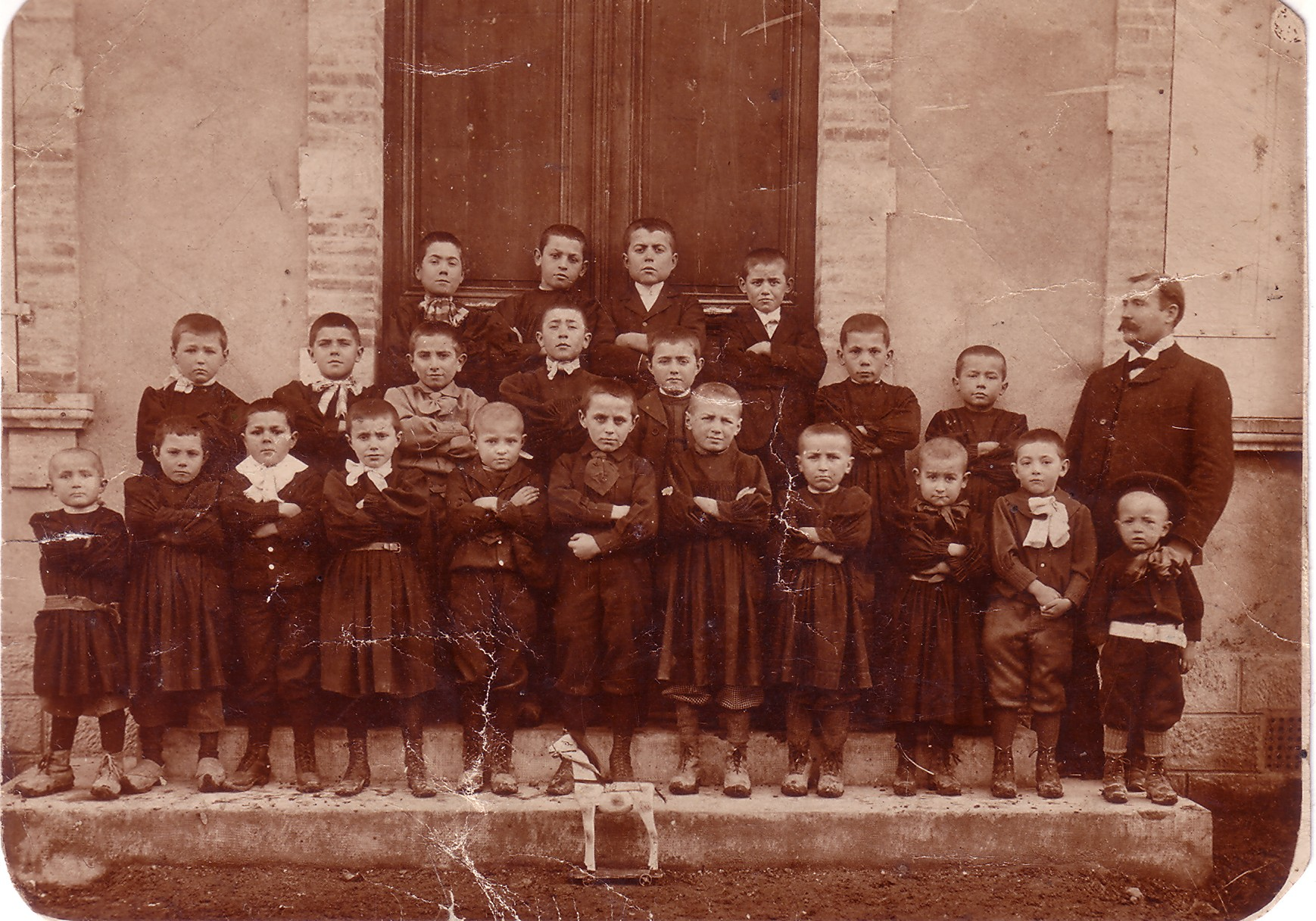 Photo de classe des élèves de l'école de Saint-Laurent (Haute-Garonne) en 1904. Photo prise sur les marches de la mairie